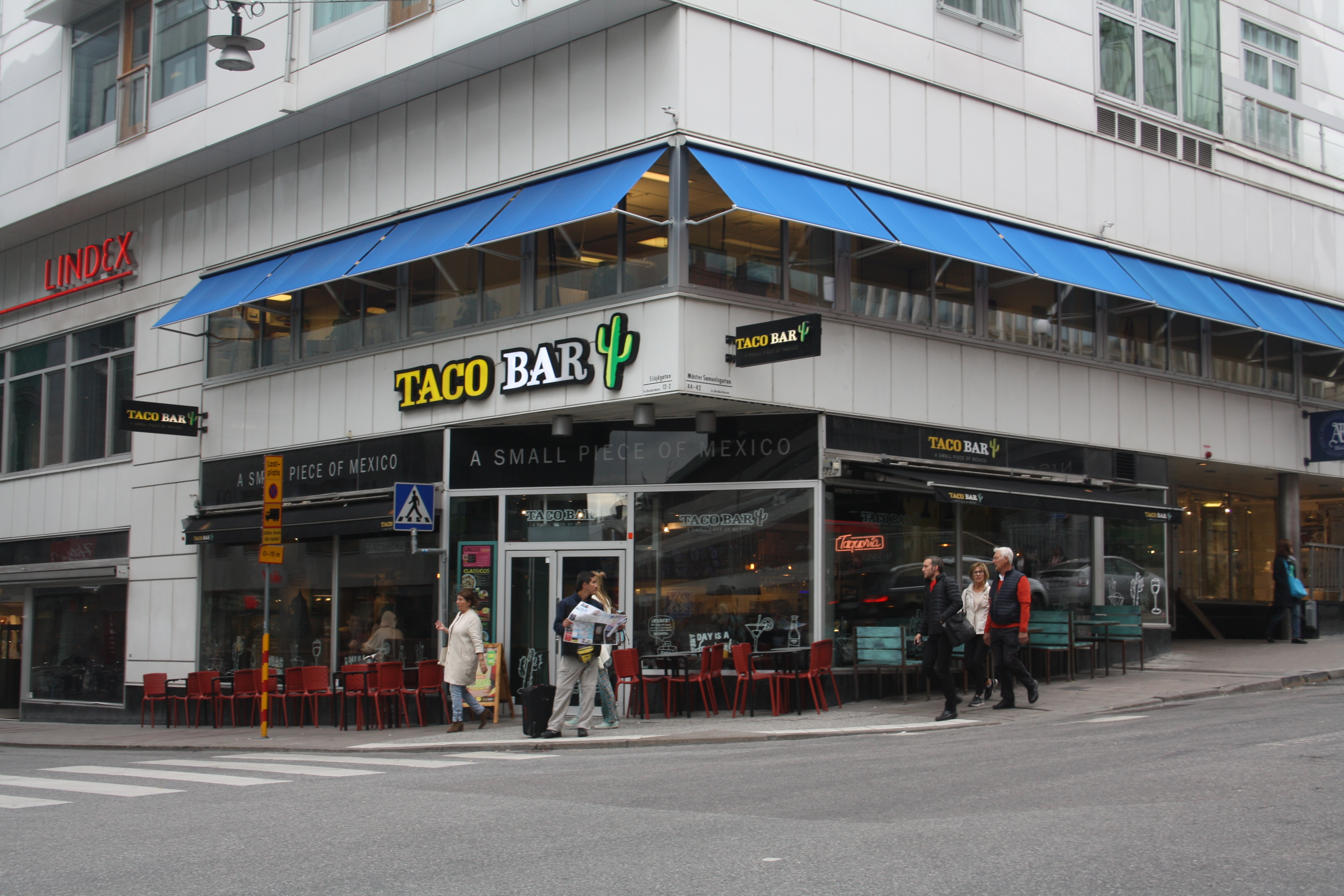 Tacobar i Stockholm